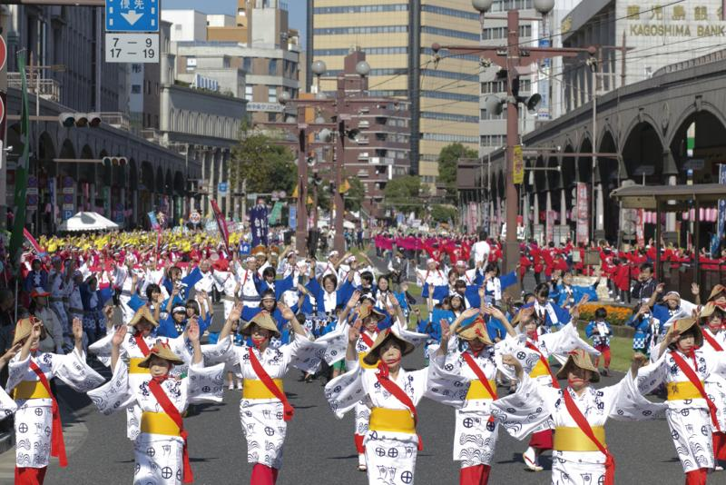 おはら祭の風景